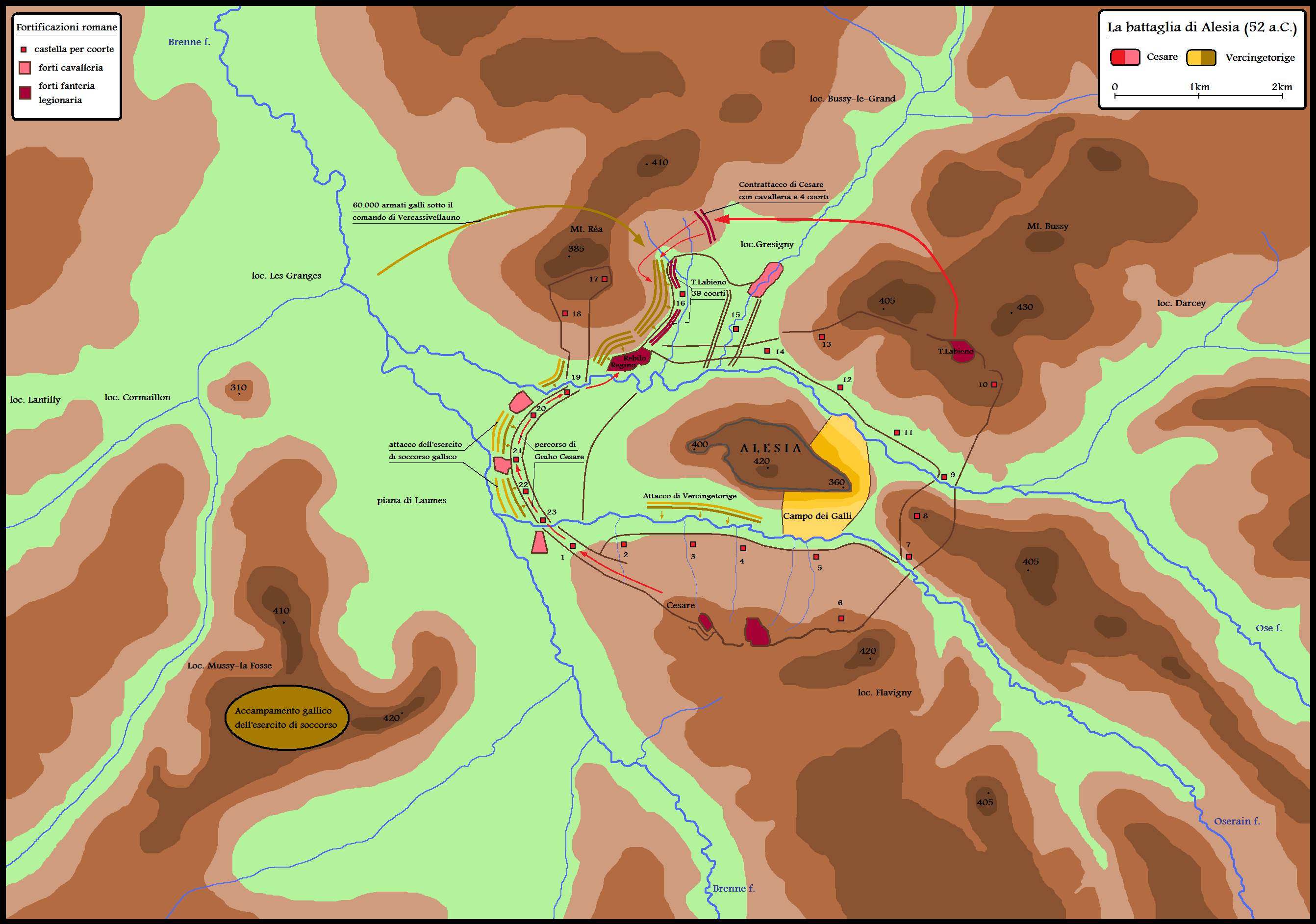 Mappa della battaglia di Alesia del 52 a.C.